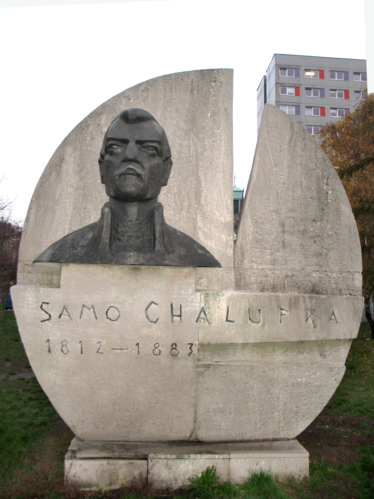 Busta Sama Chalupku v Bratislave